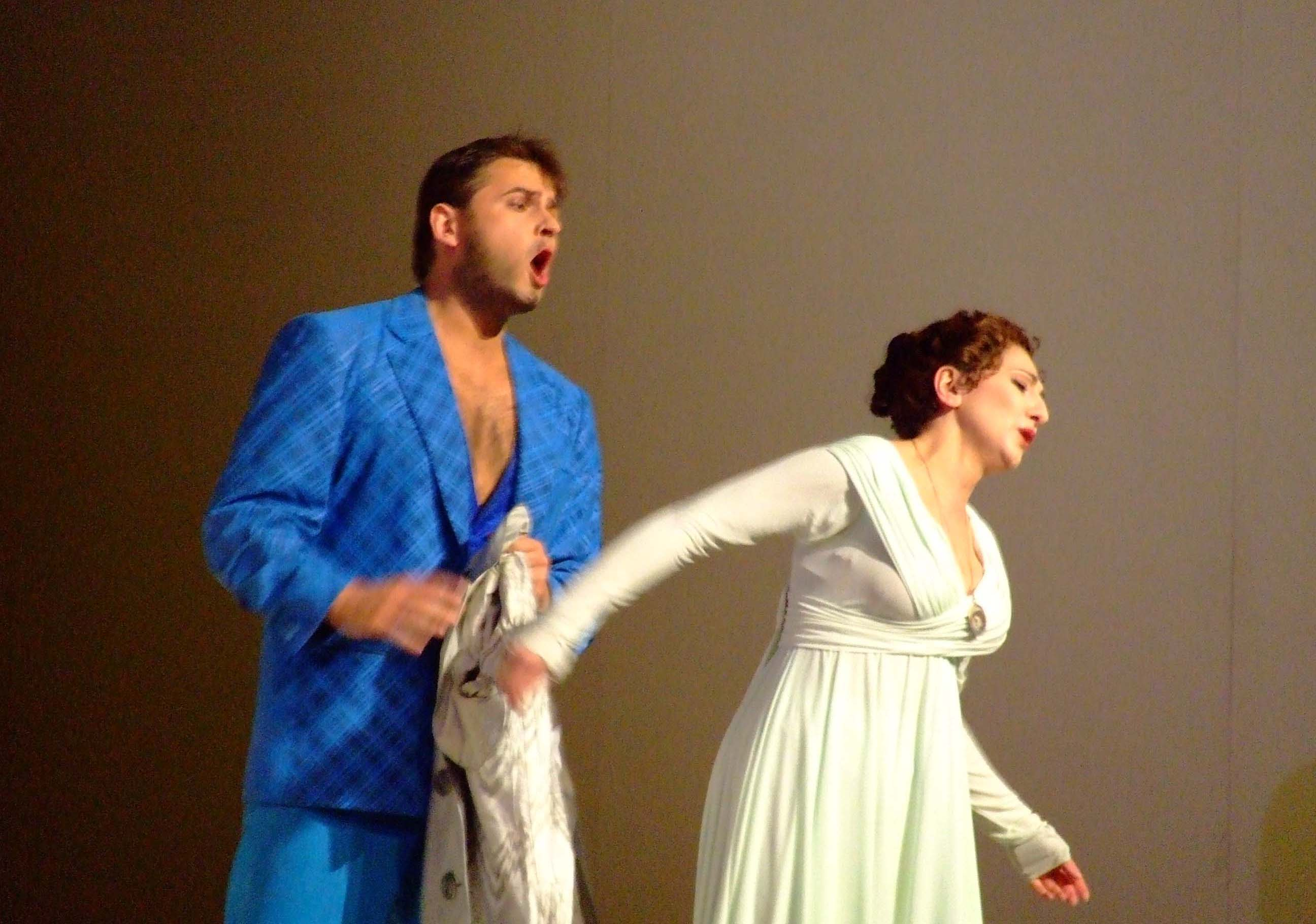 Blagoj Nacoski